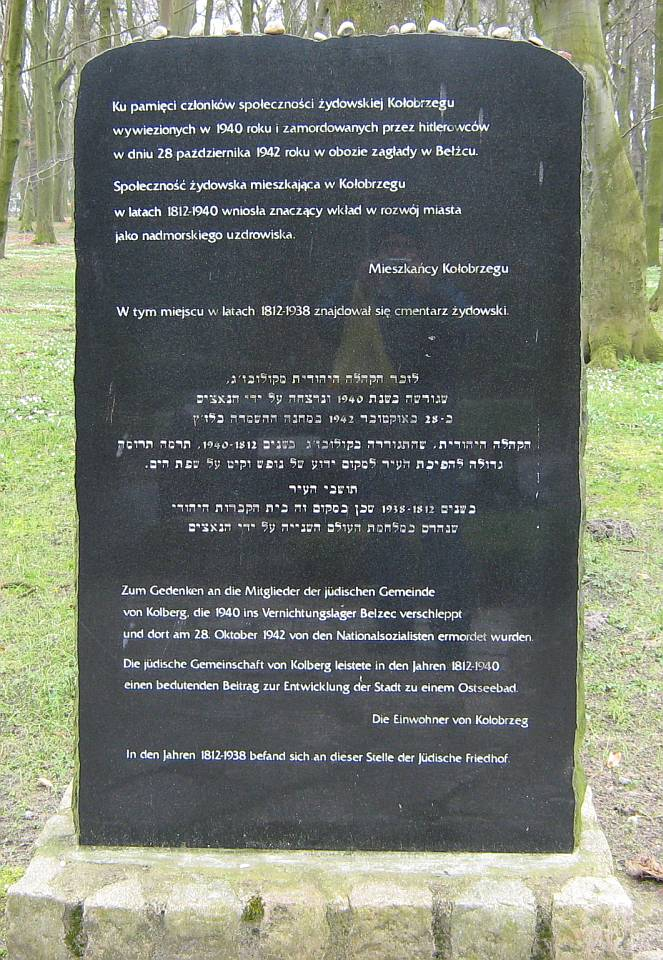 Kołobrzeg. Pomnik ku pamięci dawnych żydowskich mieszkańców w lapidarium.